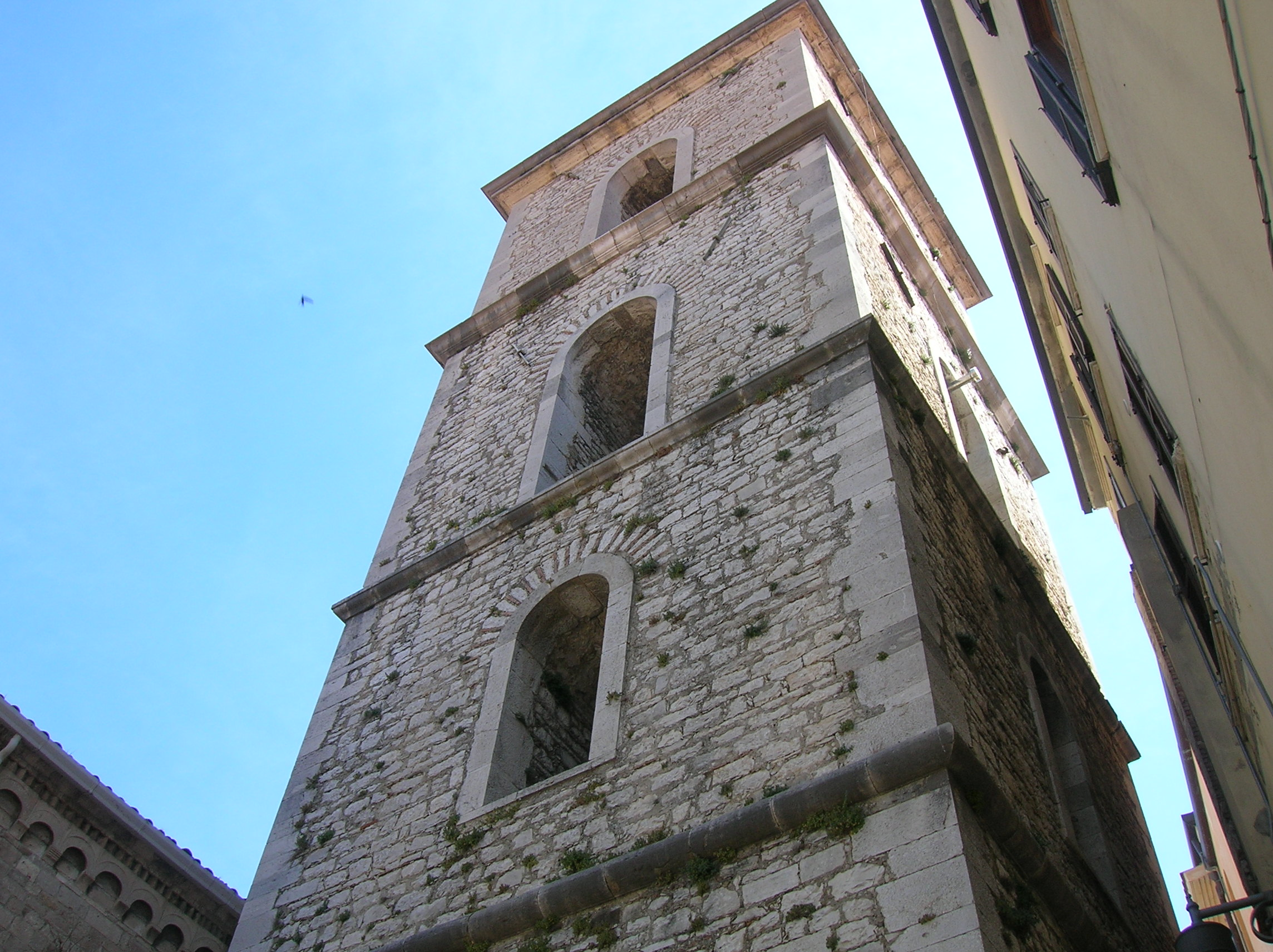 Campanile chiesa di San Michele Arcangelo, Potenza (Italia).